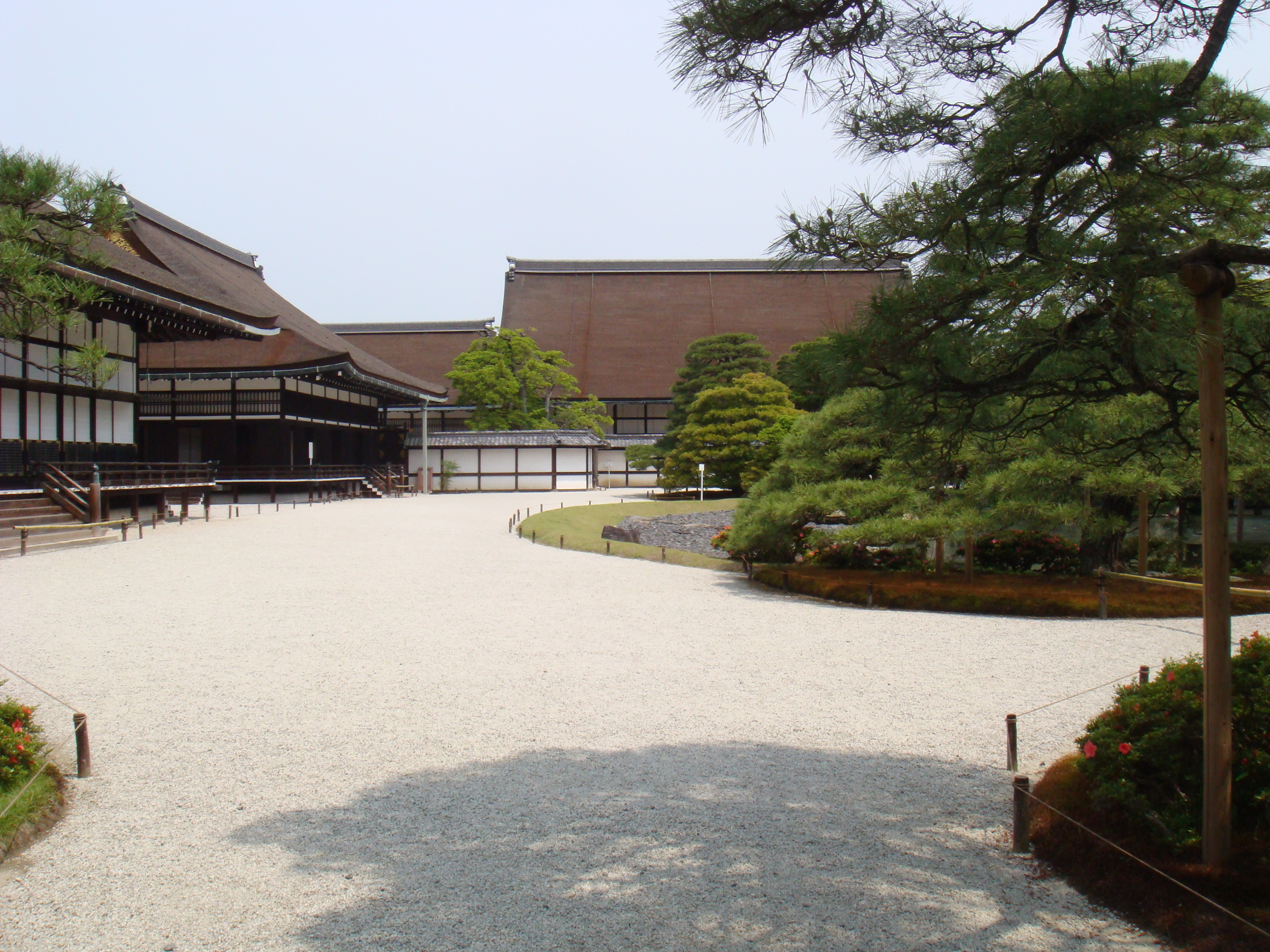 Kyoto